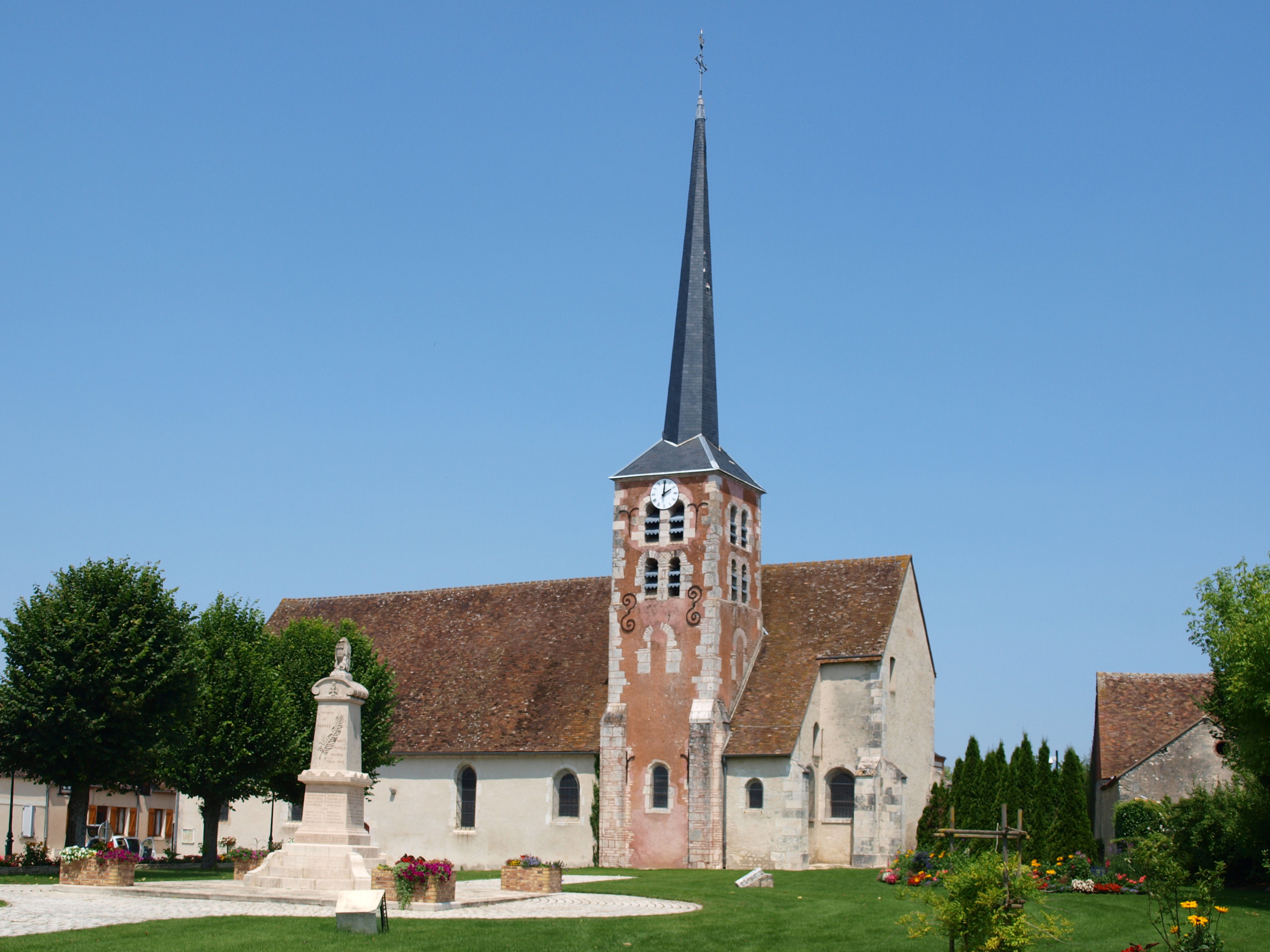 Pannes (Loiret, France) ; église